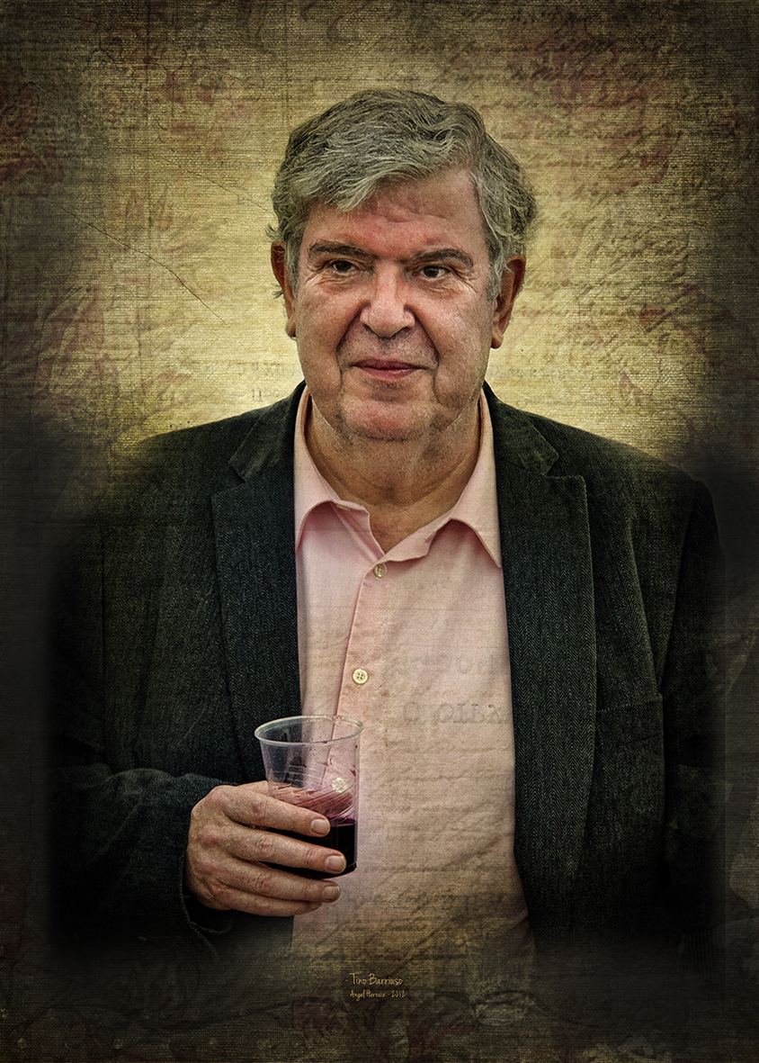 Retrato de medio cuerpo en color. Tino sostiene un vaso de plástico con vino como homenaje a unos versos de Antonio Machado. Forma parte de la colección "Retratos al paso"